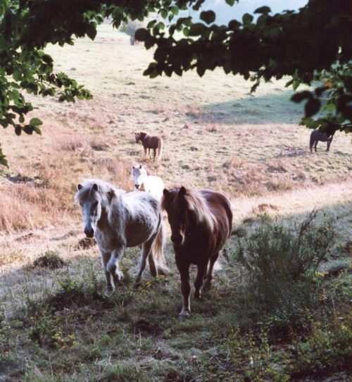 Robustpferde Islandponys Weidehaltung